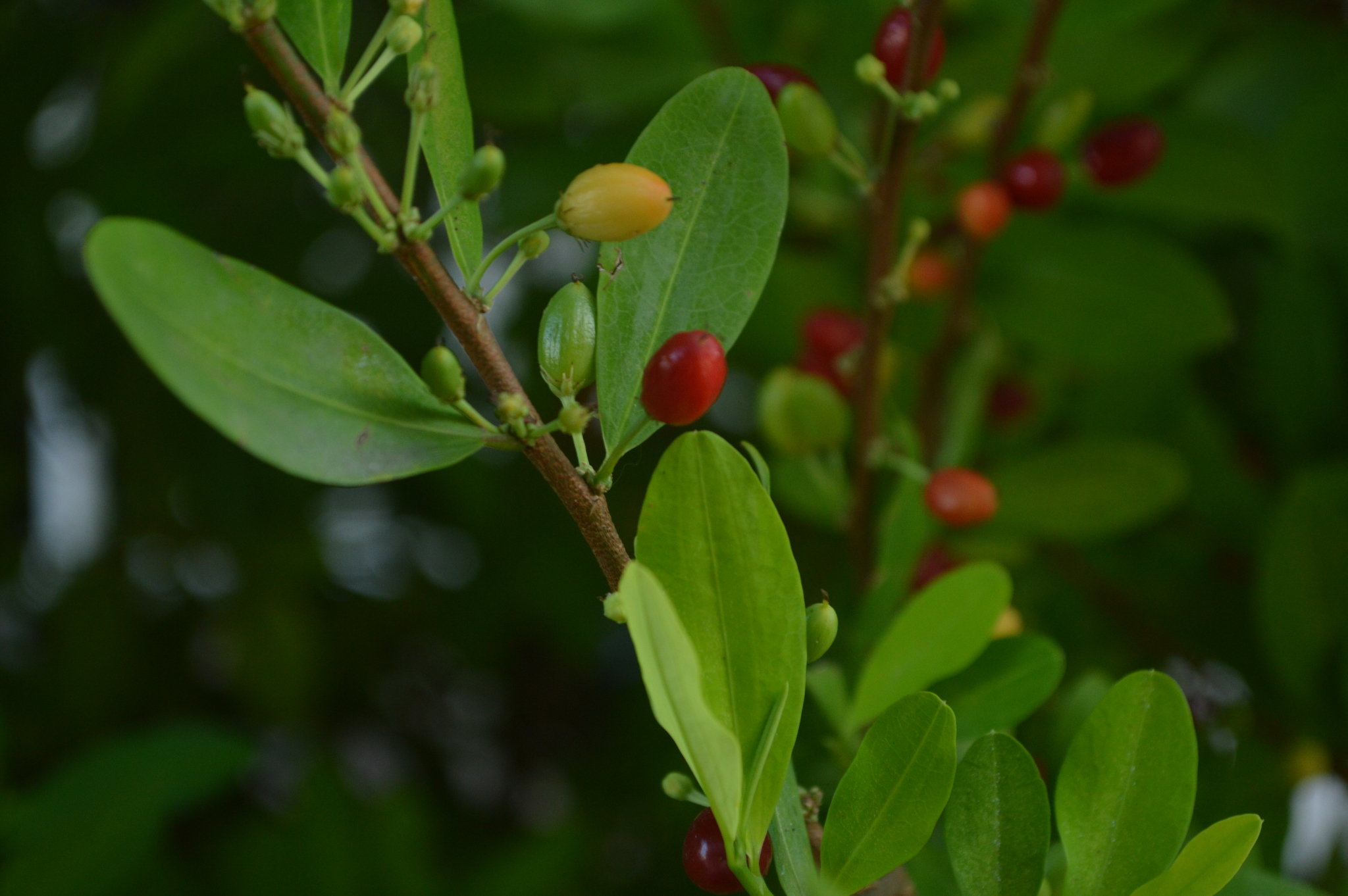 Hojas y frutos de coca (Erythroxylum coca) en Villavicencio, Meta, Colombia. Foto tomada el 2 de agosto de 2018.